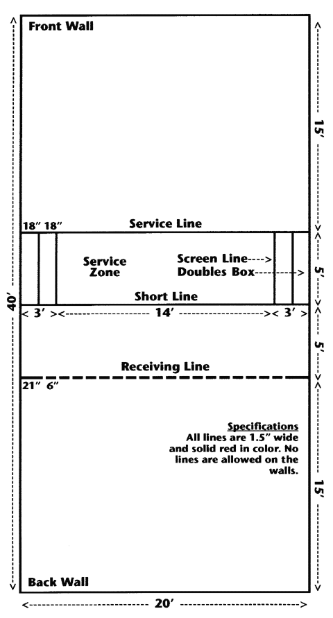 Raquetball